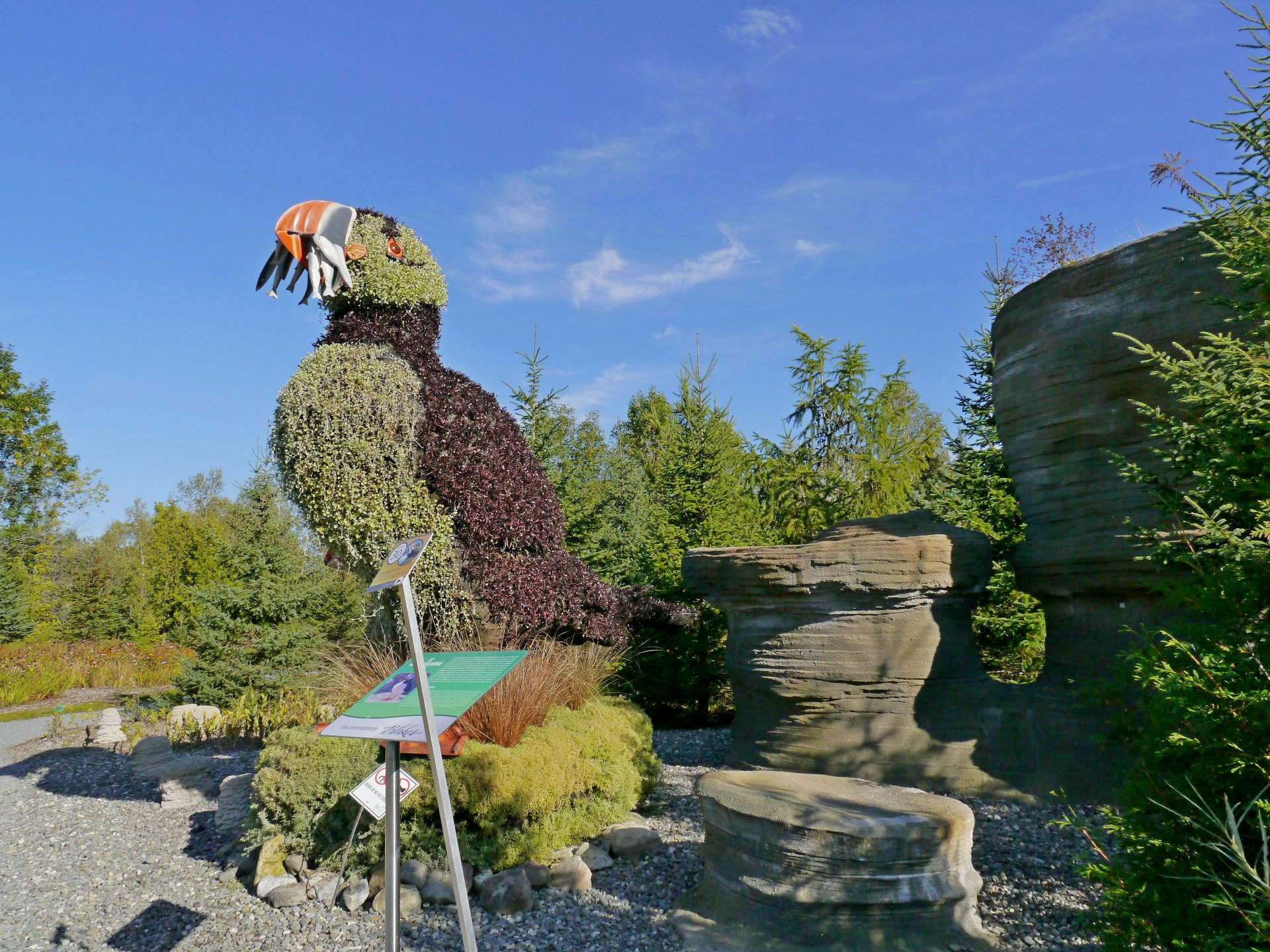 Sculpture végétale représentant un macareux moine des Iles Mingan au parc Marie-Victorin de Kingsey Falls, Québec.